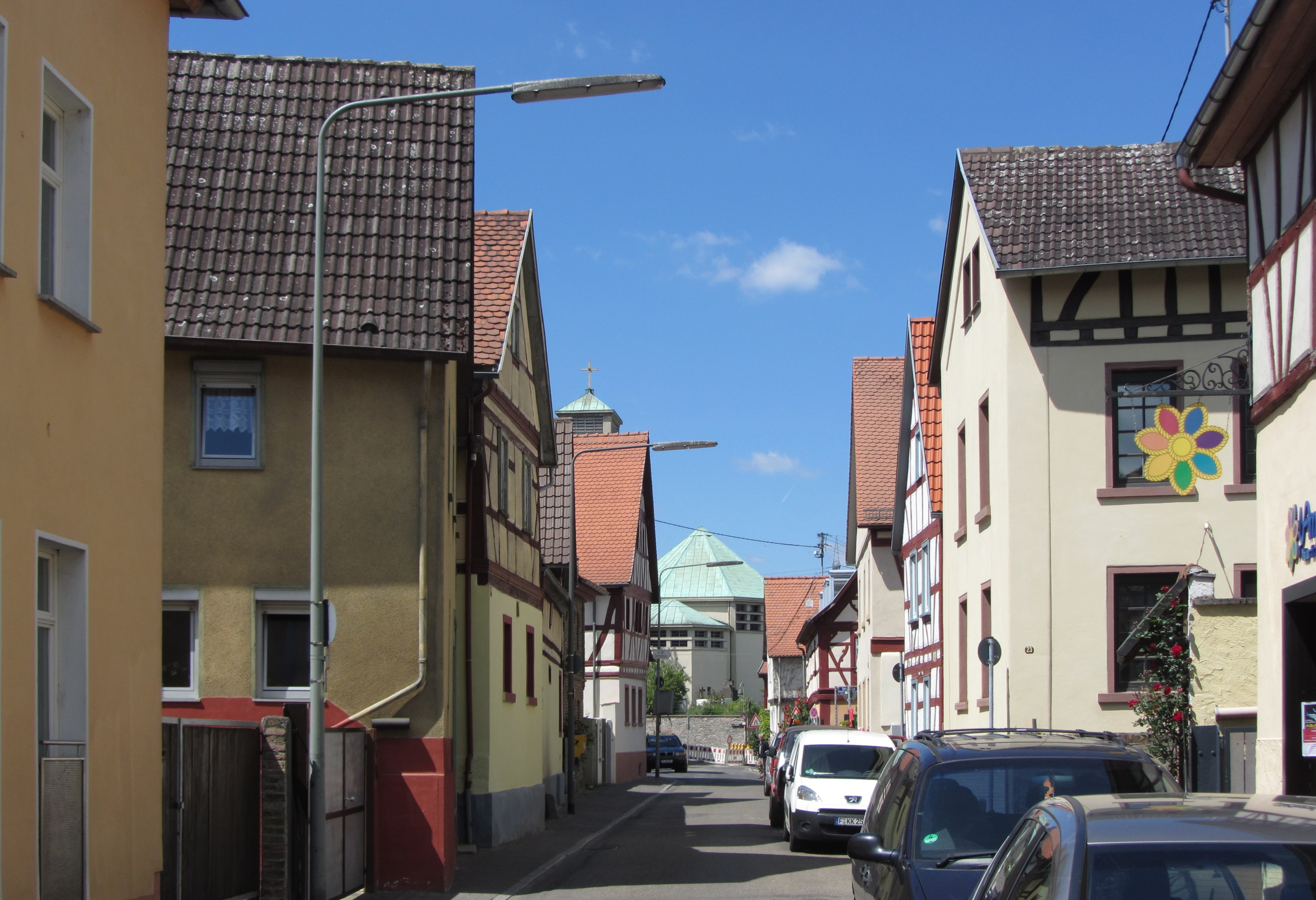 Blick in die Straße Alt Niederursel